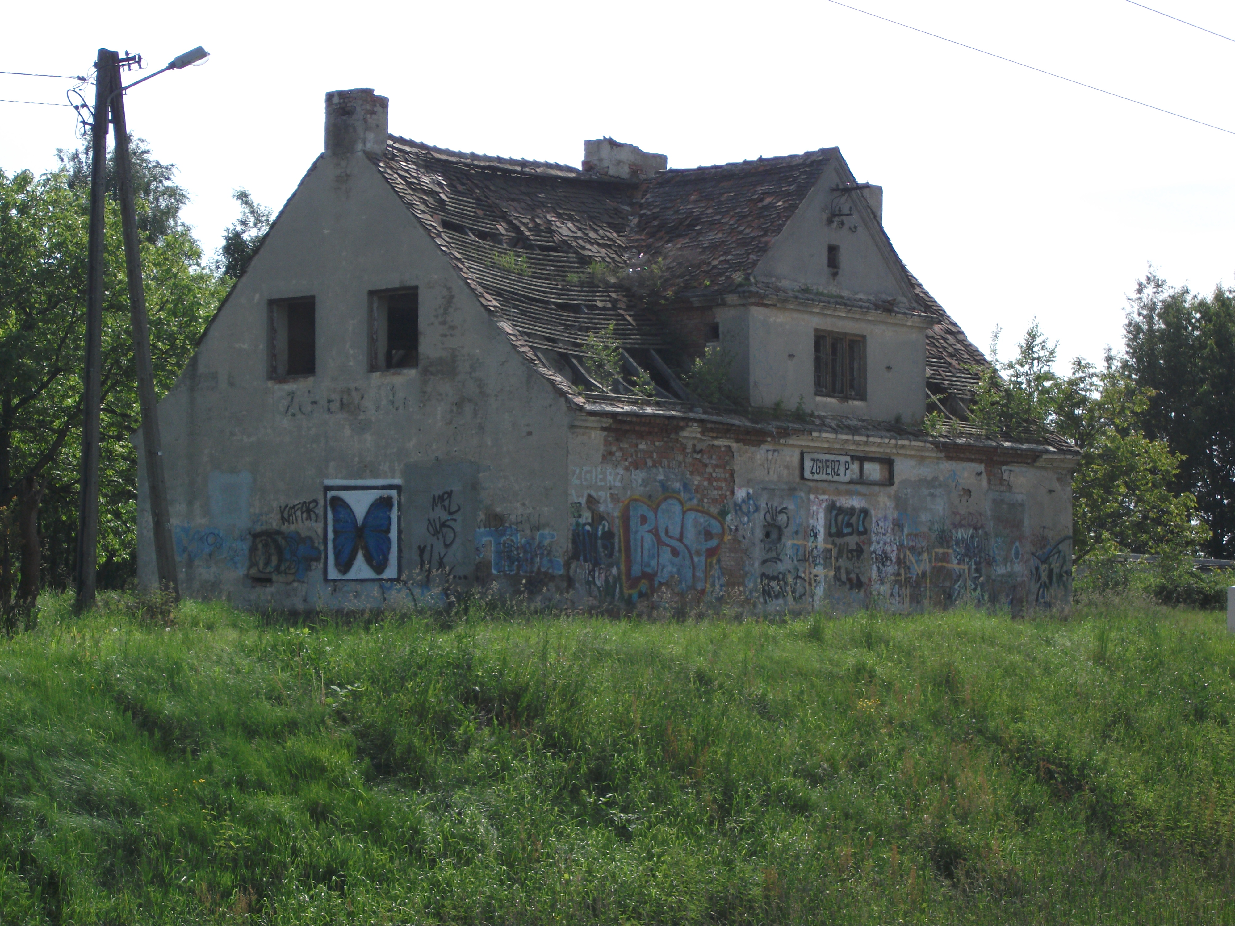 Zgierz Północ - zdewastowany budynek stacyjny PKP